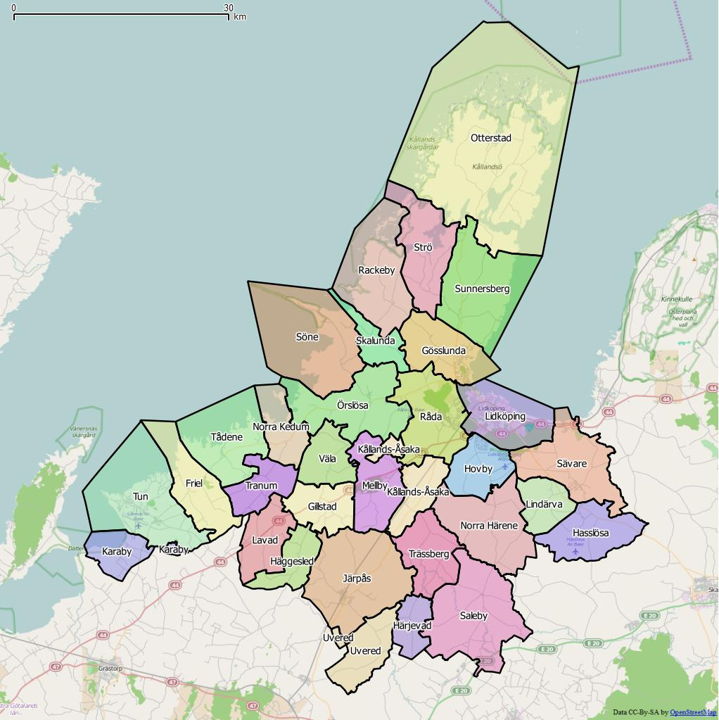 Distriktsindelningen i Kristinehamns kommun World file: 98.26059628283115899 0 0 -98.26059628283115899 1396062.18702349020168185 8130782.01686796545982361